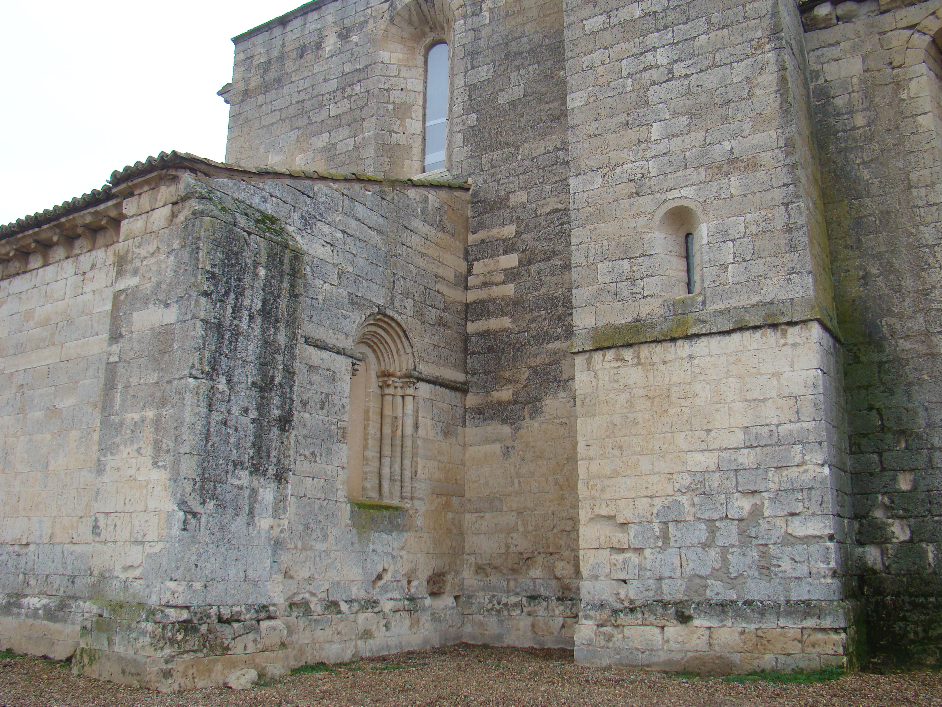 Monasterio de Palazuelos en la provincia de Valladolid. Fachada norte donde se ve el saliente de la capilla de Santa Inés, que fue capilla funeraria.